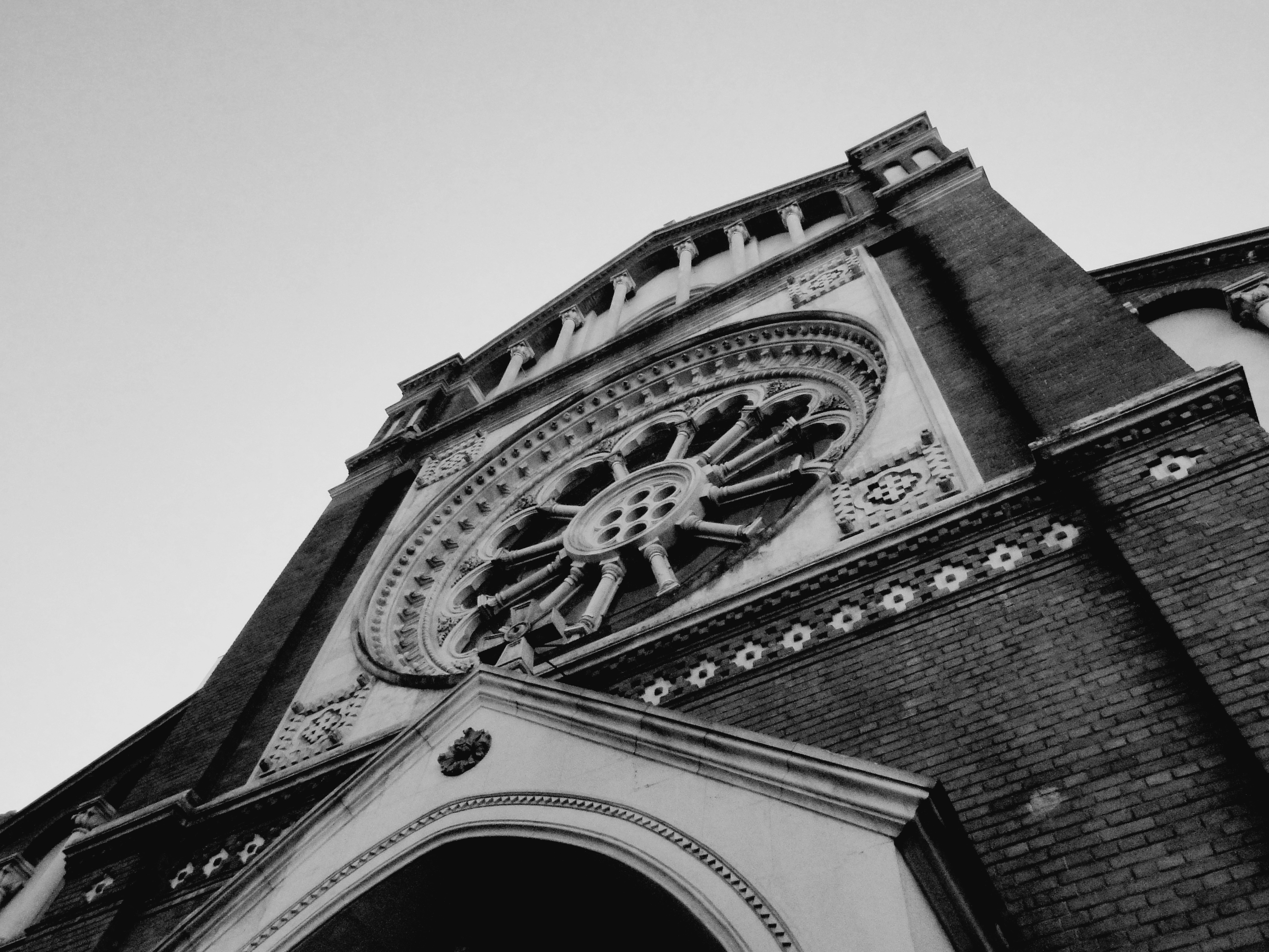 Catedrala romano-catolică „Sf. Iosif“